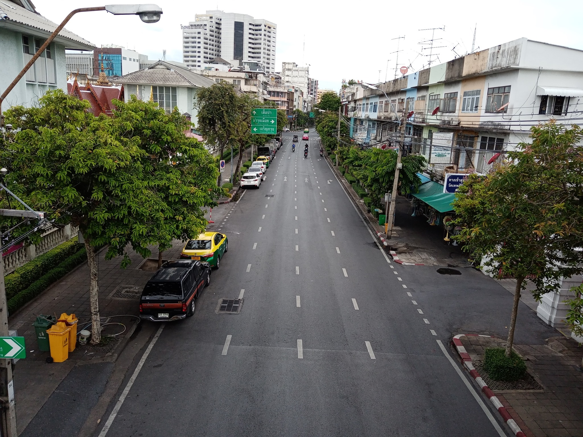 ถนนหลวง ช่วงระหว่างห้าแยกนพวงศ์กับห้าแยกพลับพลาไชย